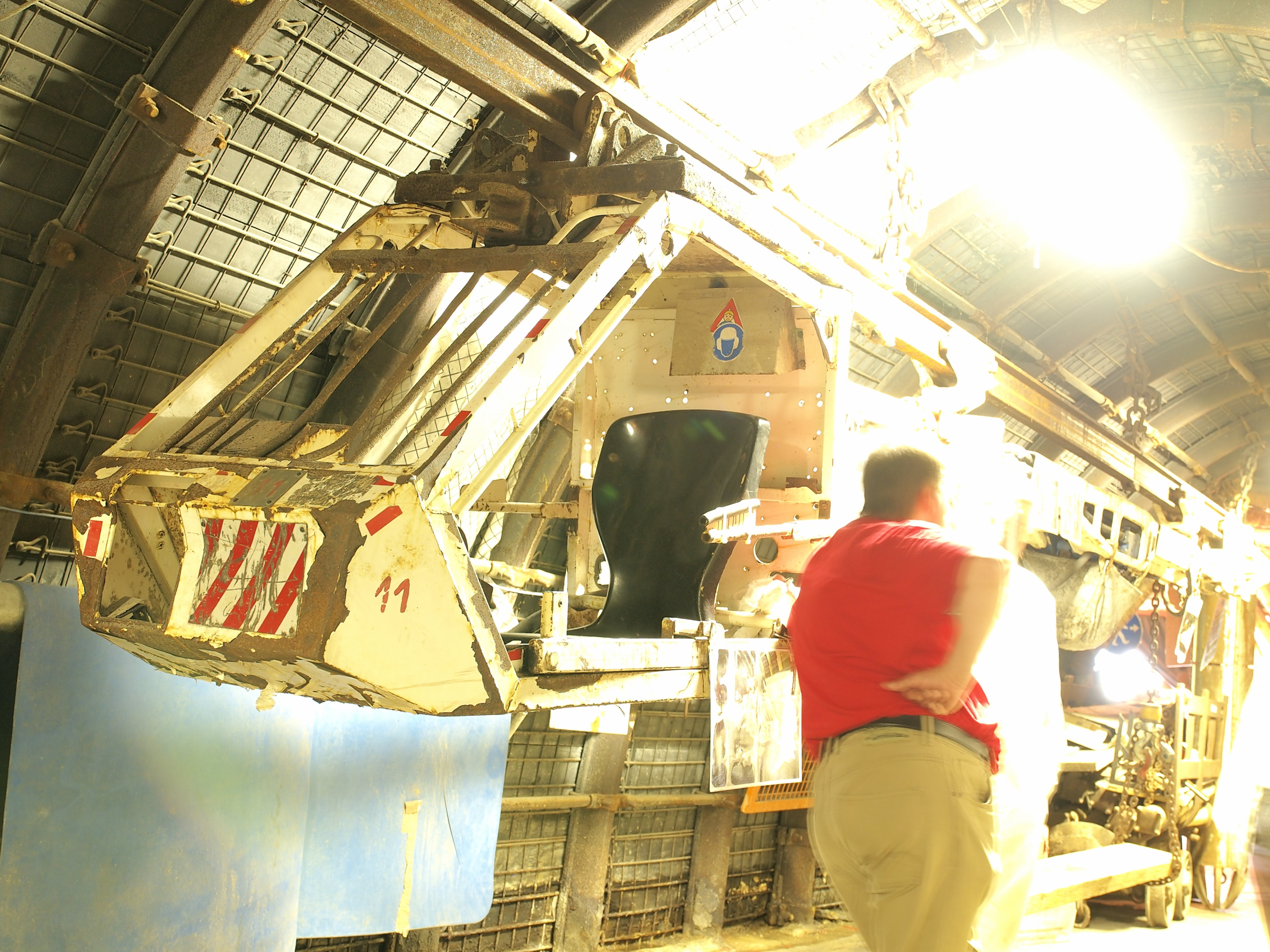 Gelsenkirchen, Nordsternpark, Dieselkatze im Bergbaustollen - Eine Dieselkatze ist ein Triebfahrzeug mit angehängter Last für eine im Stollenfirst aufgehängte Einschienenhängebahn